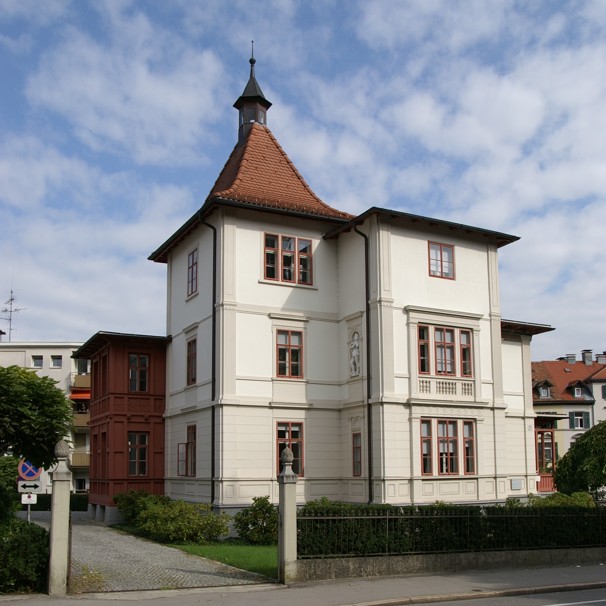 aus dem DEHIO Vorarlberg 1983: Römerstrasse Nr.24 Erbaut um 1900 von Romedius Wacker gegliederter Baukörper reiche Dachformen, variierende Pilastergliederung der Fassade. *** In Bregenz.